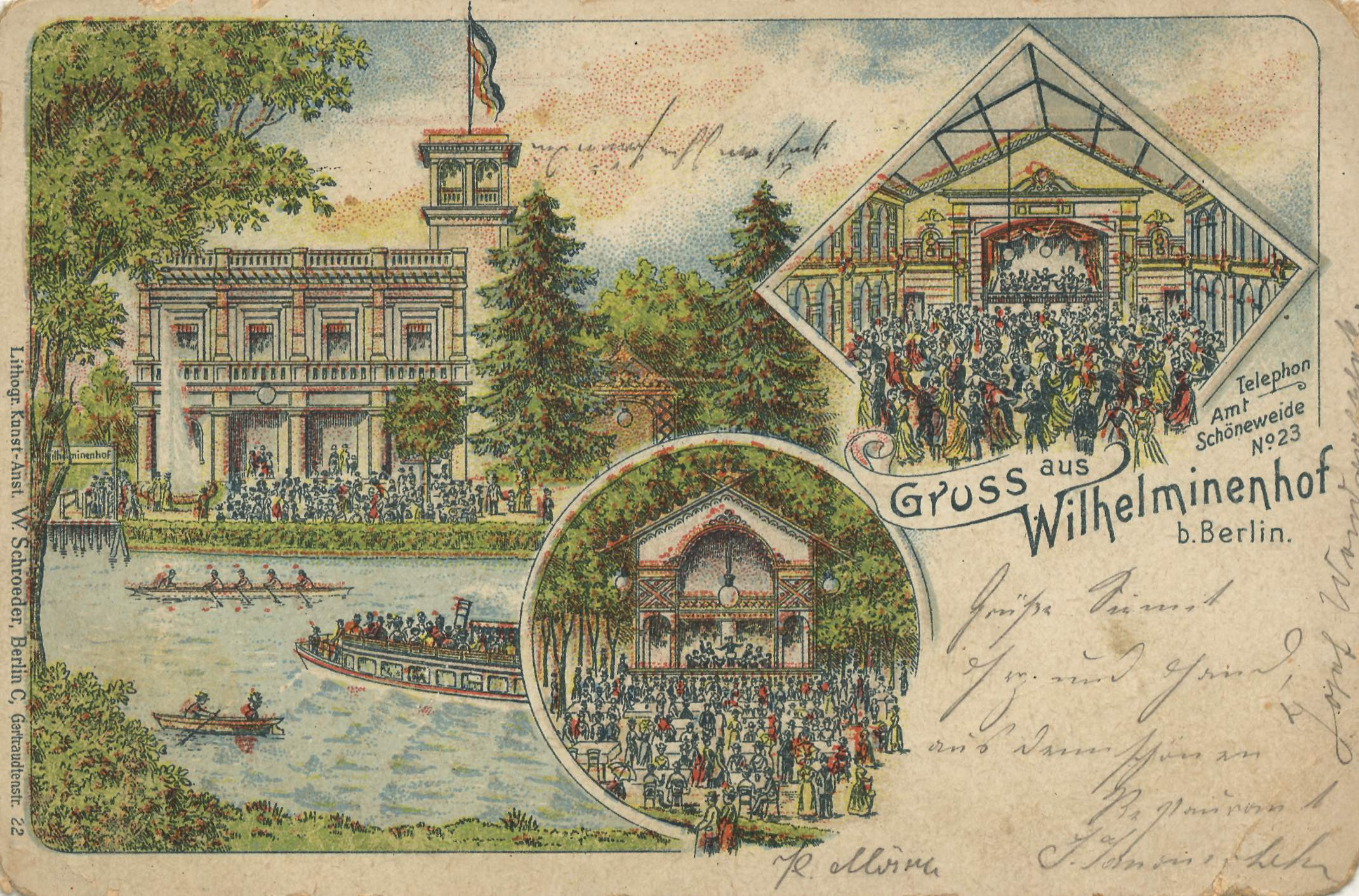 Ausflugslokal Wilhelminenhof in Berlin-Oberschöneweide